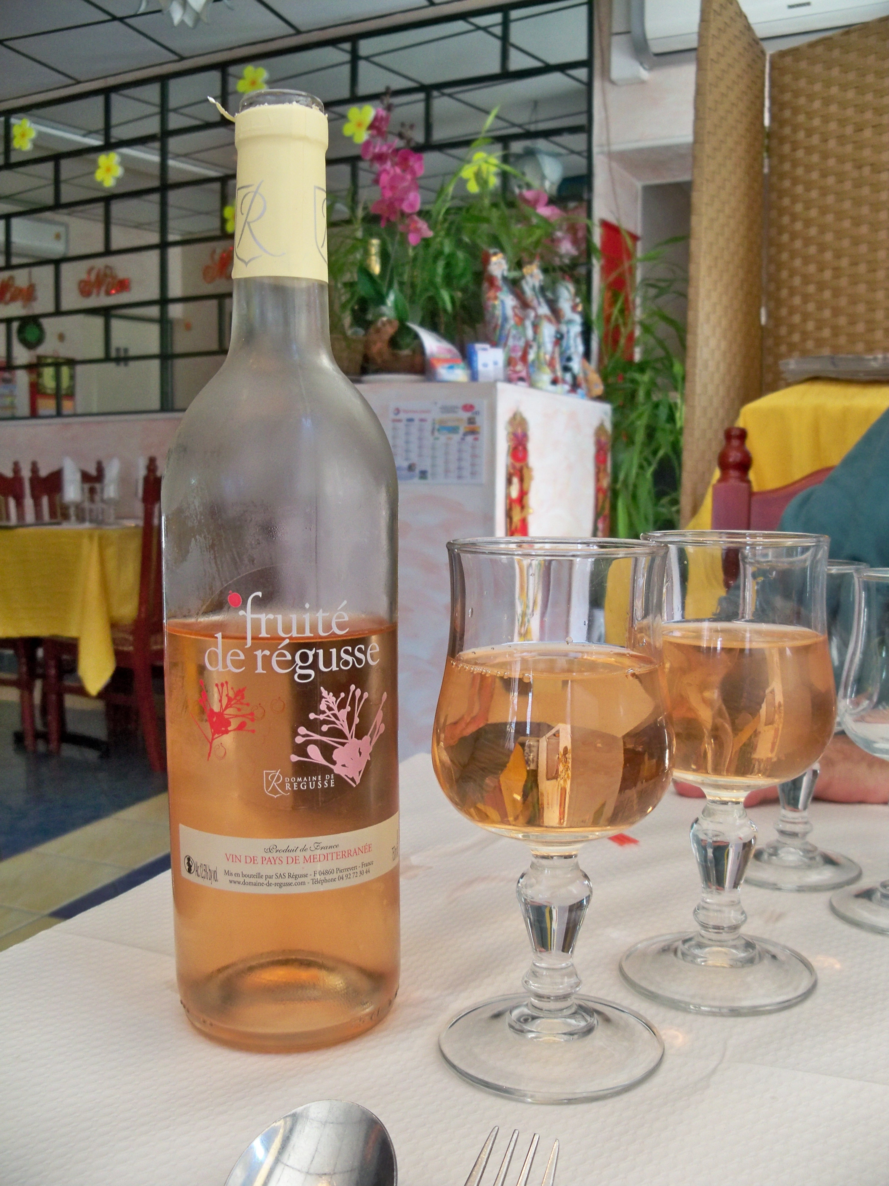 Fuité de Régusse (Pierrevert), vin de pays de la méditerranée